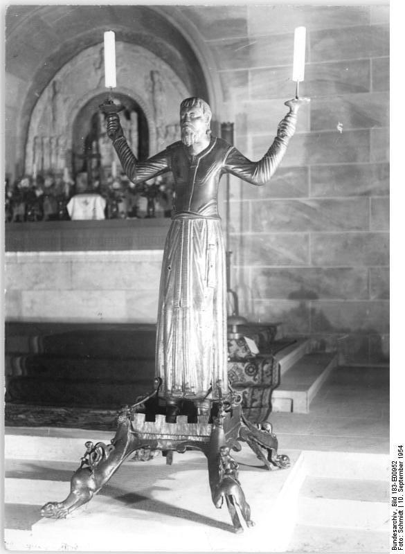 Erfurt, "Kerzenträger" Zentralbild TBD-Schmidt-10.9.1954 Kunstschätze aus Dom und Severi-Kirche in Erfurt. UBz: Erfurter Wolfram - Kerzenträger kunstgeschichtlich bekannt - 1170.